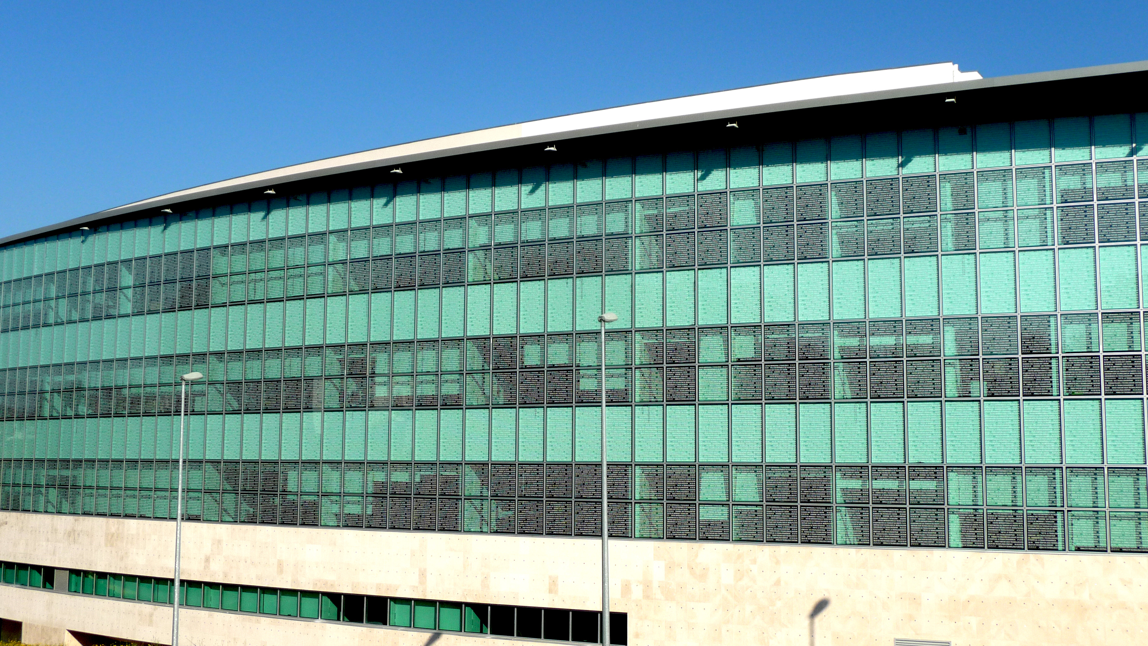 Centro Empresarial e Tecnológico (São João da Madeira) - edifício sede.